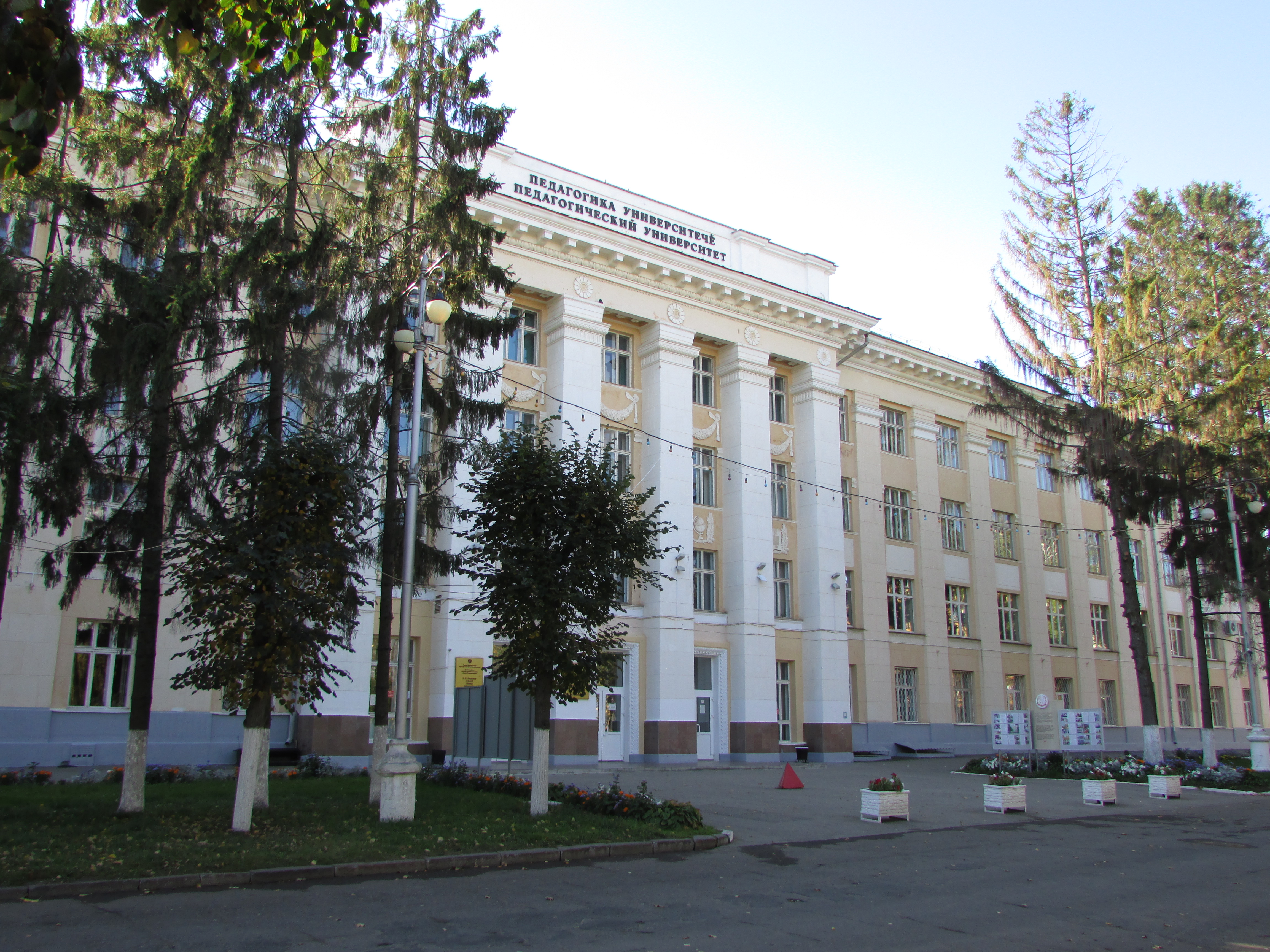 Здание чувашского государственного педагогического института им И.Я. Яковлева: улица Карла Маркса, 38, Чебоксары, Чувашия